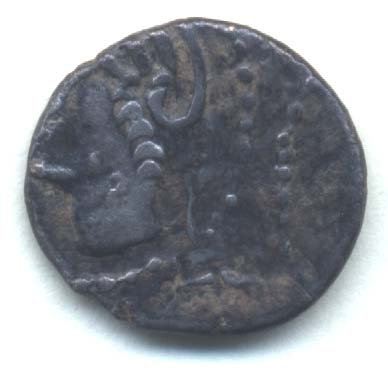 Monnaie gauloise, environs de Besançon, Denier Togirix en argent. Droit : Tête à gauche, le casque figuré par une triple visière, l'arcade sourcilière rendue par un bourrelet, un ruban descend du casque dans la nuque, une torsade sort du casque au niveau de l'oreille. Devant le visage, on observe le pied centripète des lettres de la légende TOGIRIX. Au pourtour, on distingue un grènetis périphérique. Collection Joël Grillon.